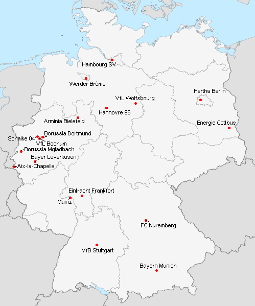 Répartition des clubs en 1.Bundesliga 2006-2007.